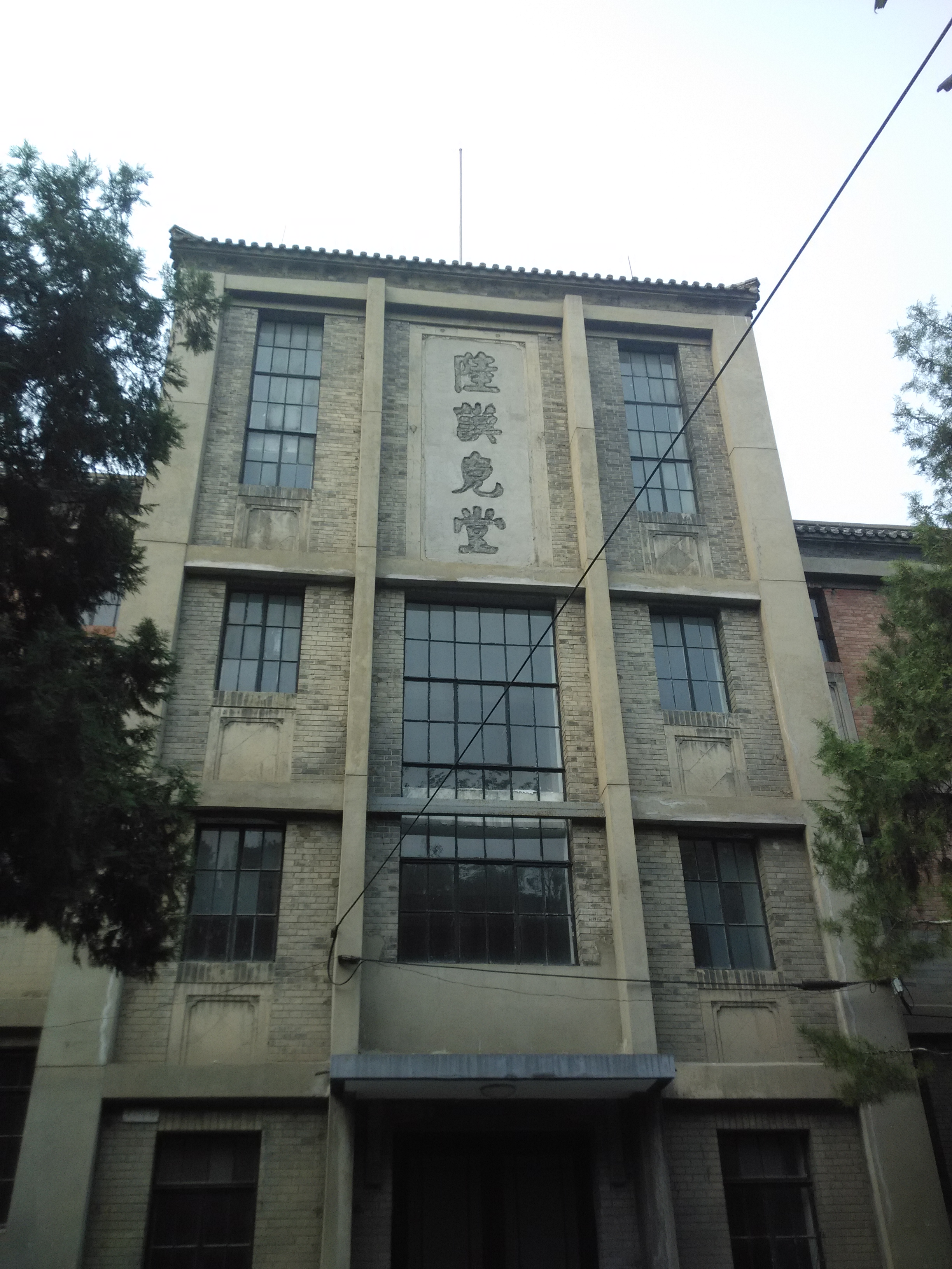 这是2014年9月于北京动物园内拍摄的陆谟克堂照片